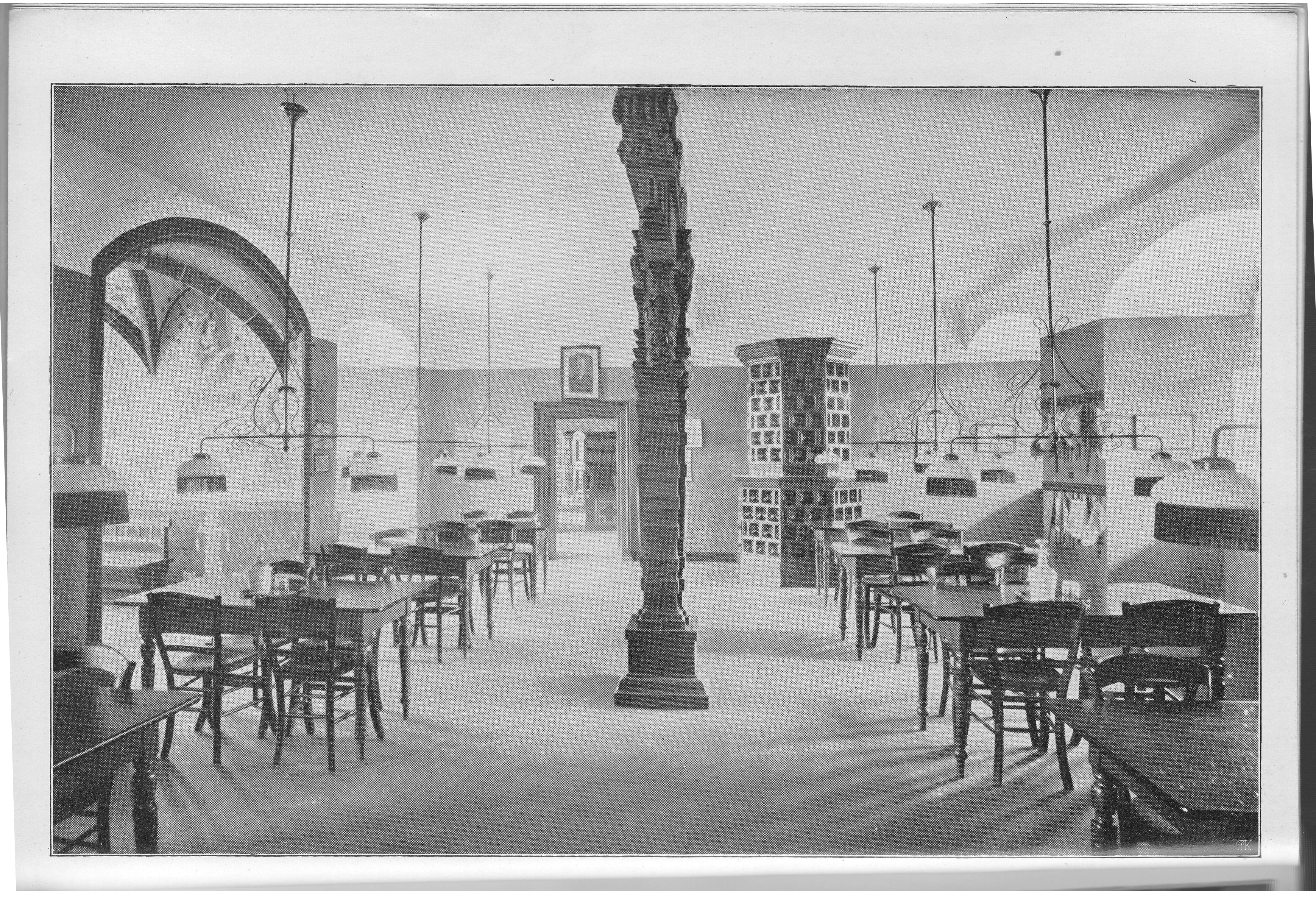 Offenbach am Main in Wort und Bild von Friedrich Jöst, Druck und Verlag Wilh. Wagner, Offenbach a. M., 1911. Die Stadtbücherei und Lesehalle.